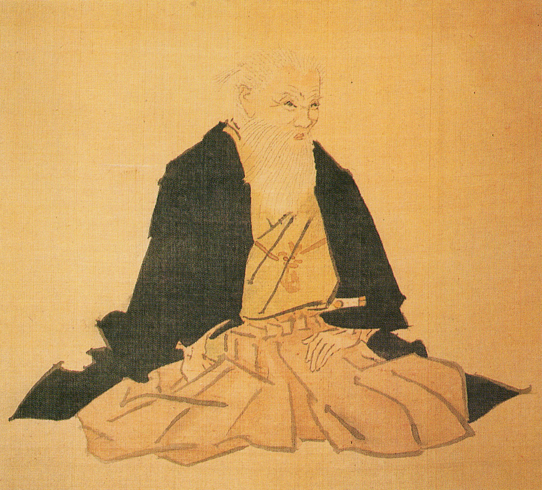 権田直助の肖像。